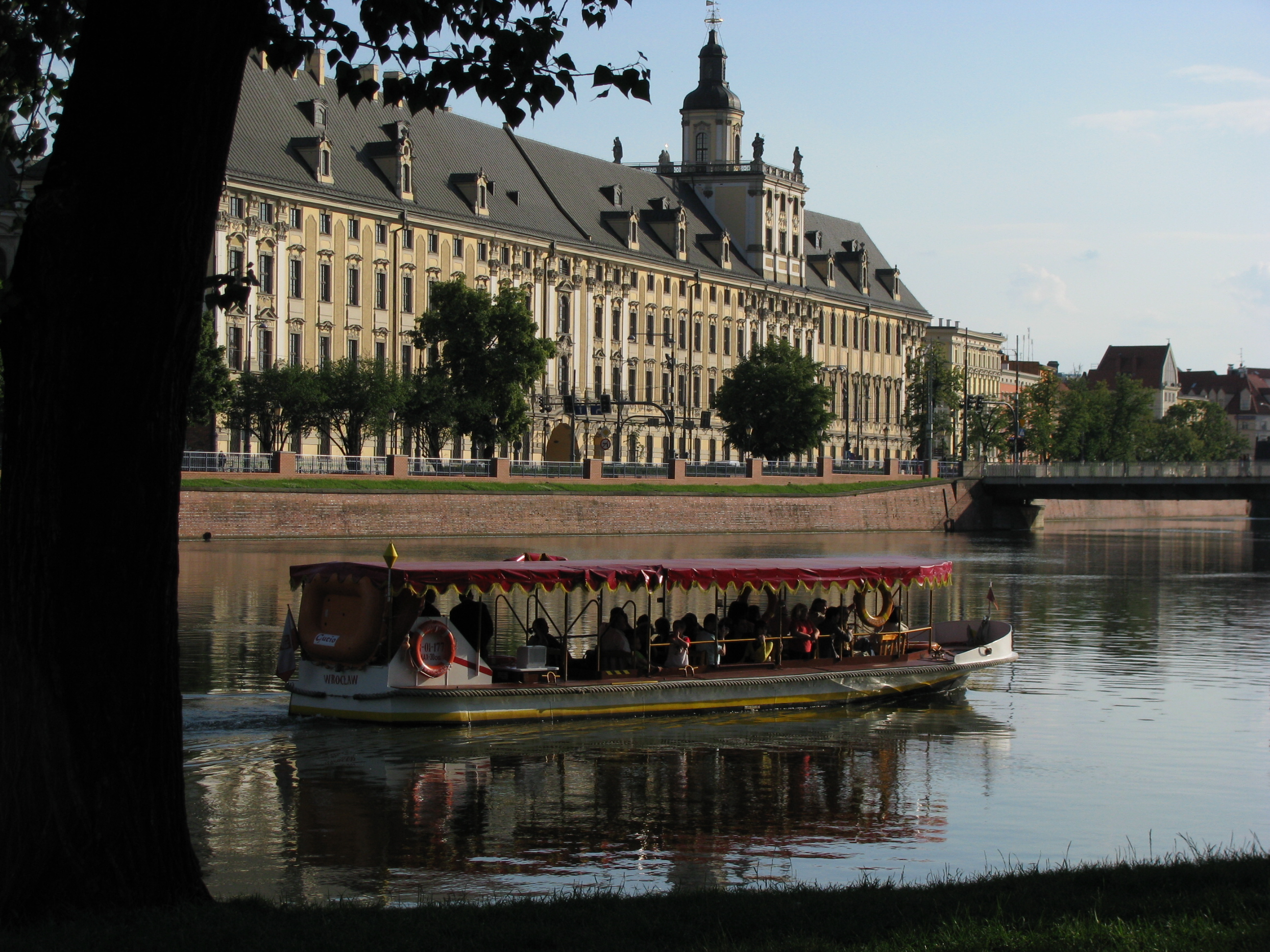 Nad Odrą